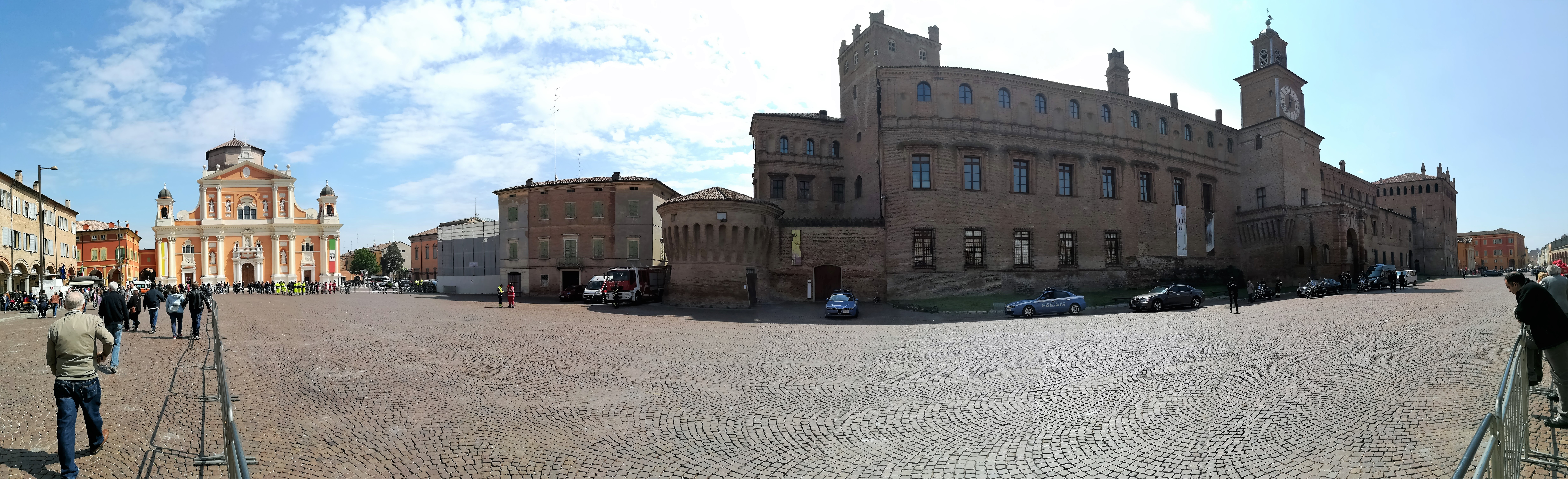 Carpi, Province of Modena.